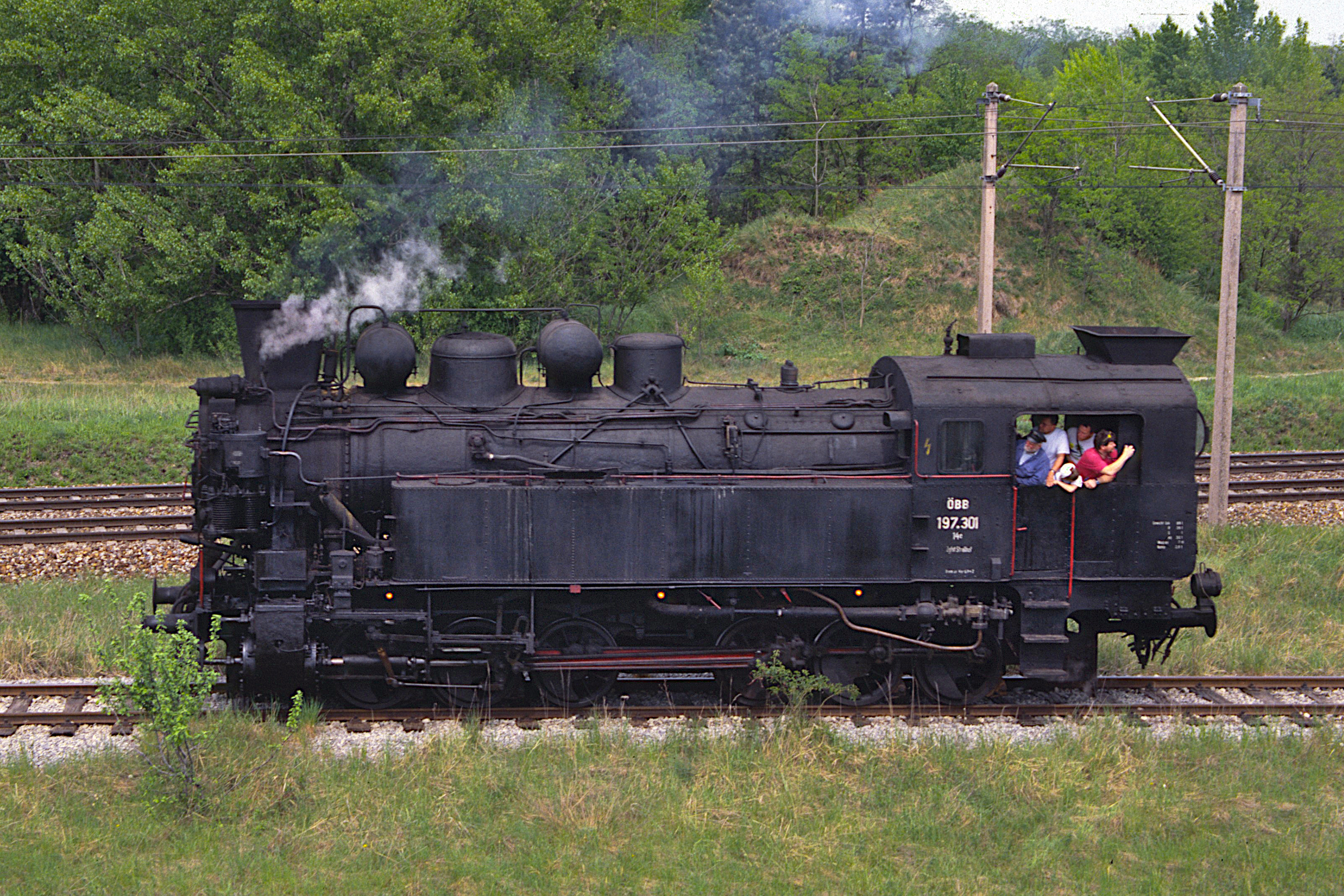 Die 197.301, eine Zahnradbahnlokomotive der Erzbergbahn, im Eisenbahnmuseum Strasshof, Niederösterreich